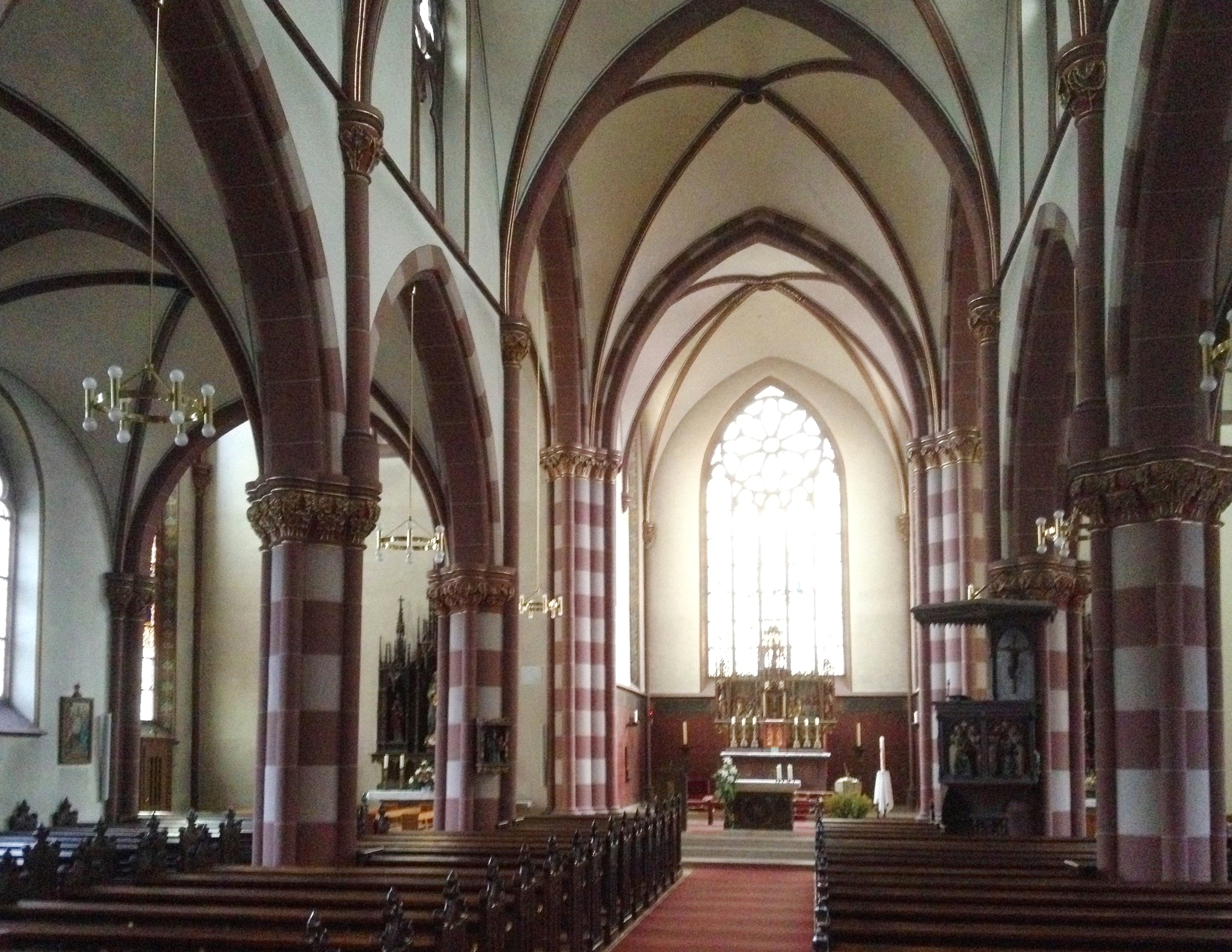 Lügde, St. Marien, Inneres